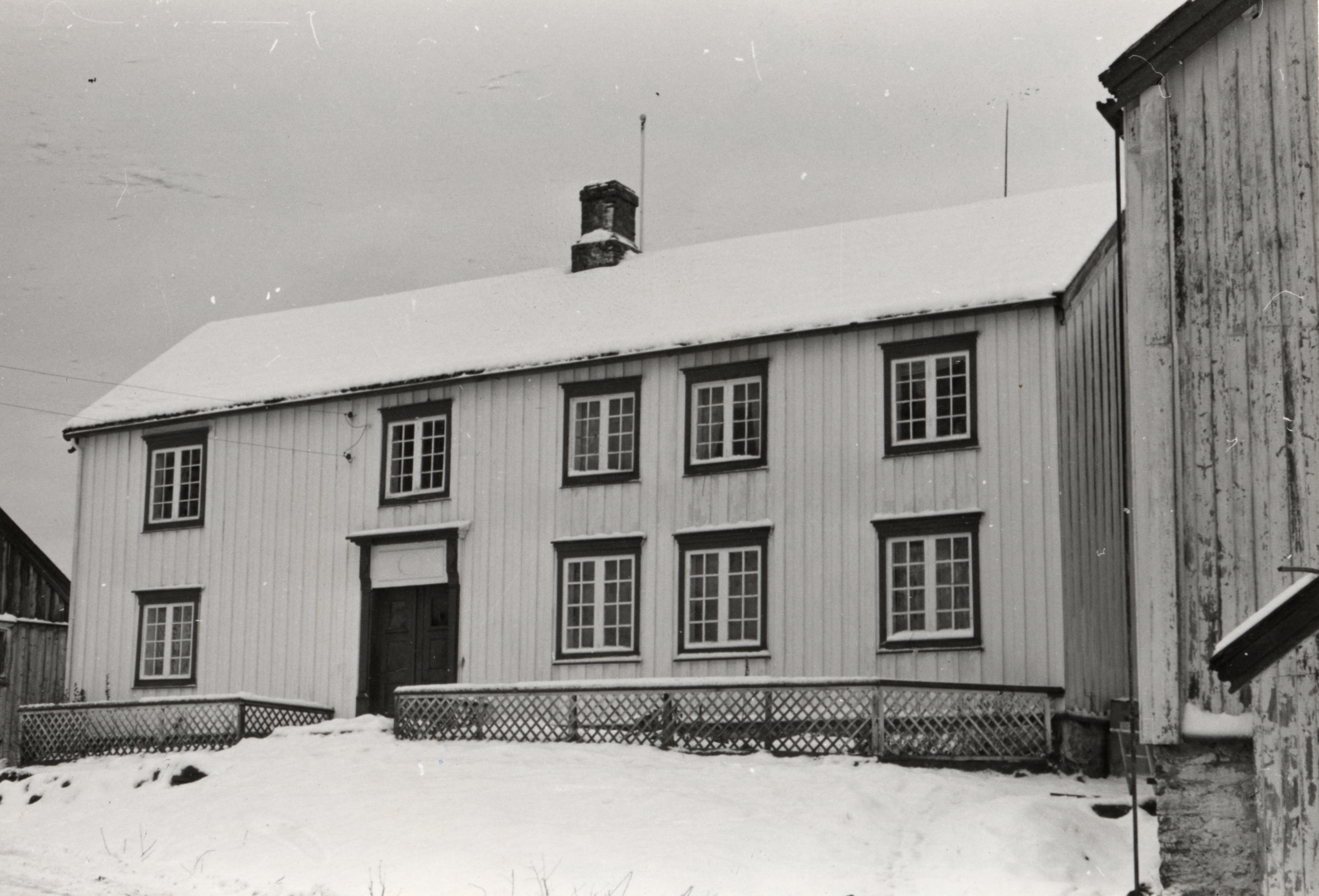 Vinjesjøen, Sæteråshuset i Mosvik, Nord-Trøndelag